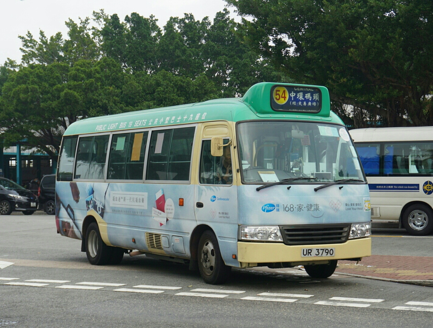 中文（香港）: 香港島專線小巴54線，剛到達中環碼頭